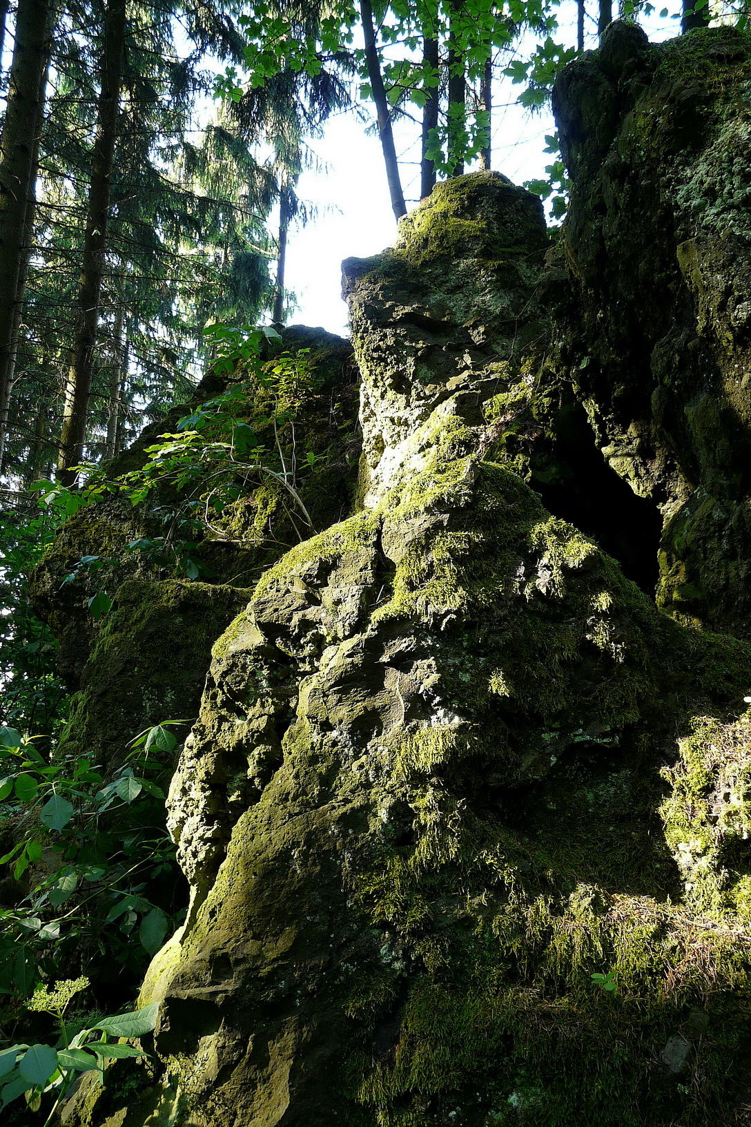 Hrádek u Mladějova, brekciové skalky lomu